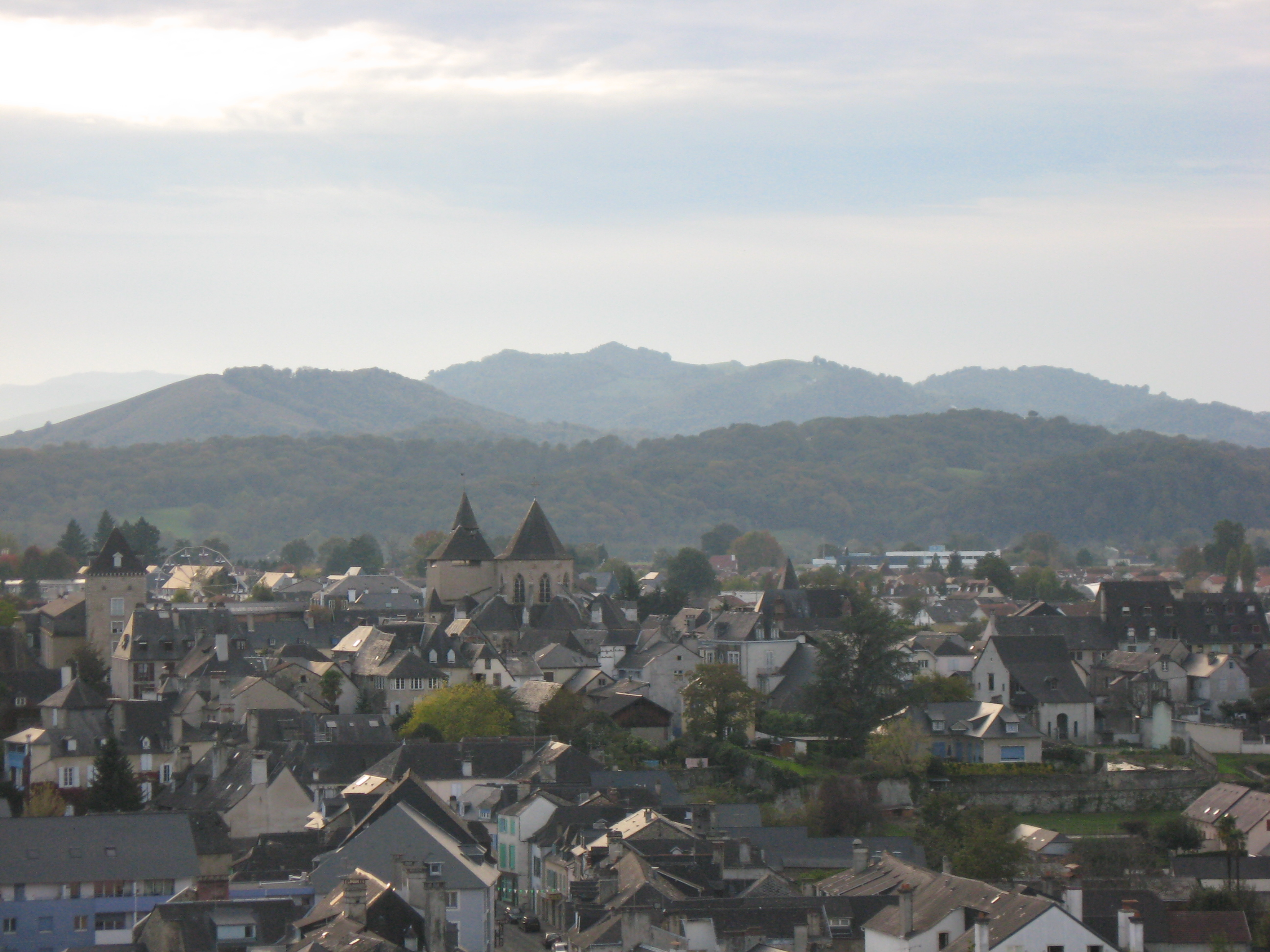 Cathédrale Sainte Marie depuis la promenade "Bellevue" à Oloron-Sainte-Marie (Pyrénées Atlantiques) Pyrénées).